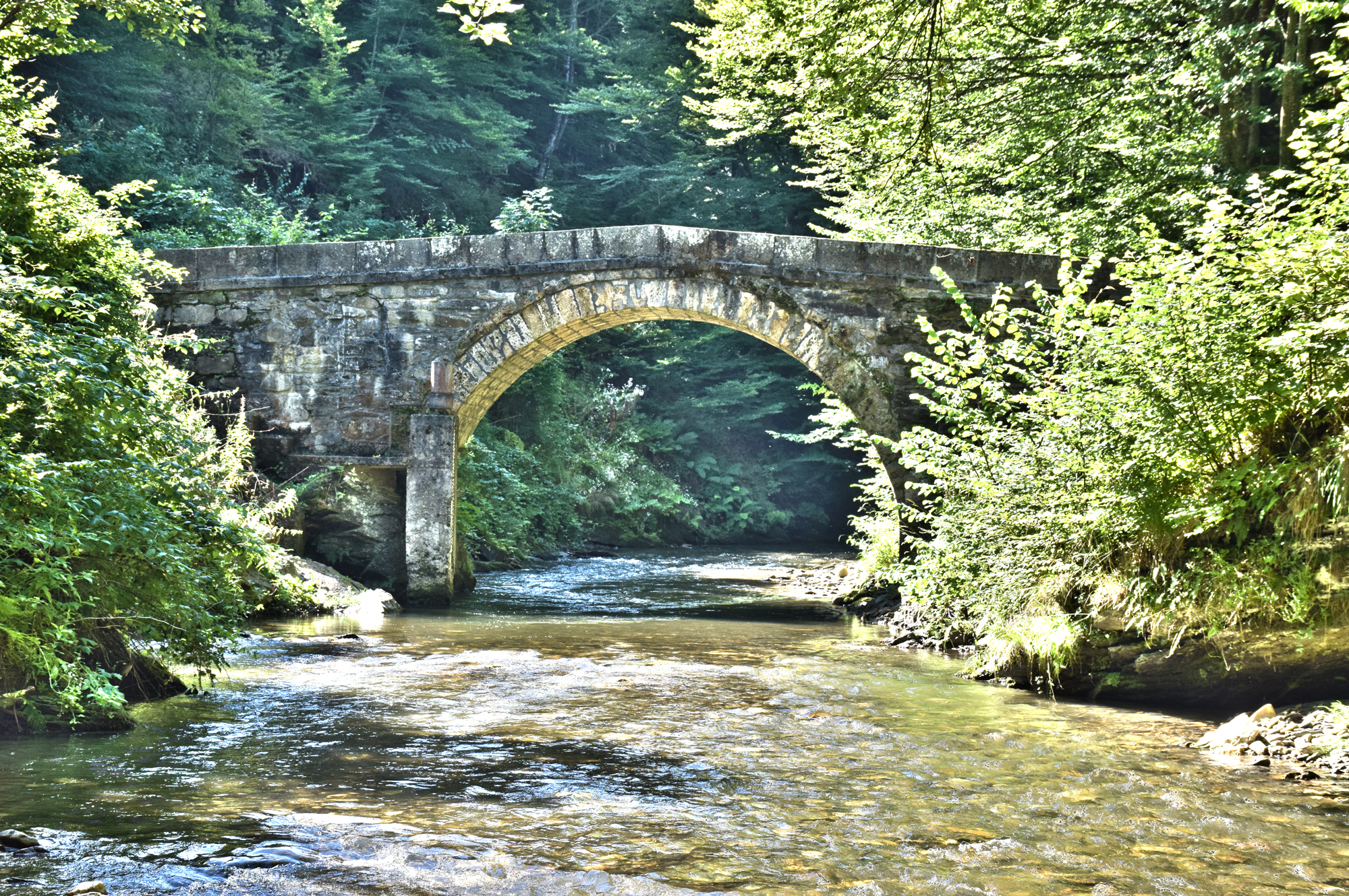 Kumanica, Serbia